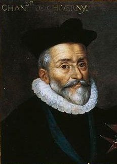 Portrait du comte Philippe Hurault de Cheverny.